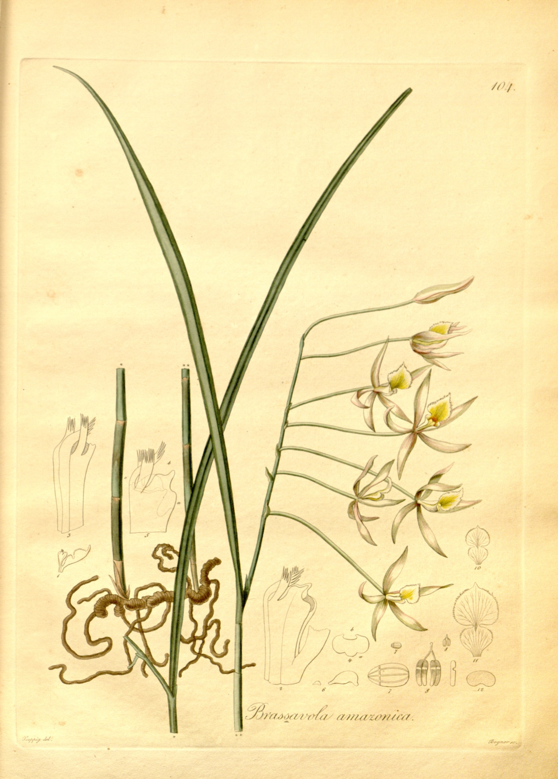 Illustration of Brassavola martiana